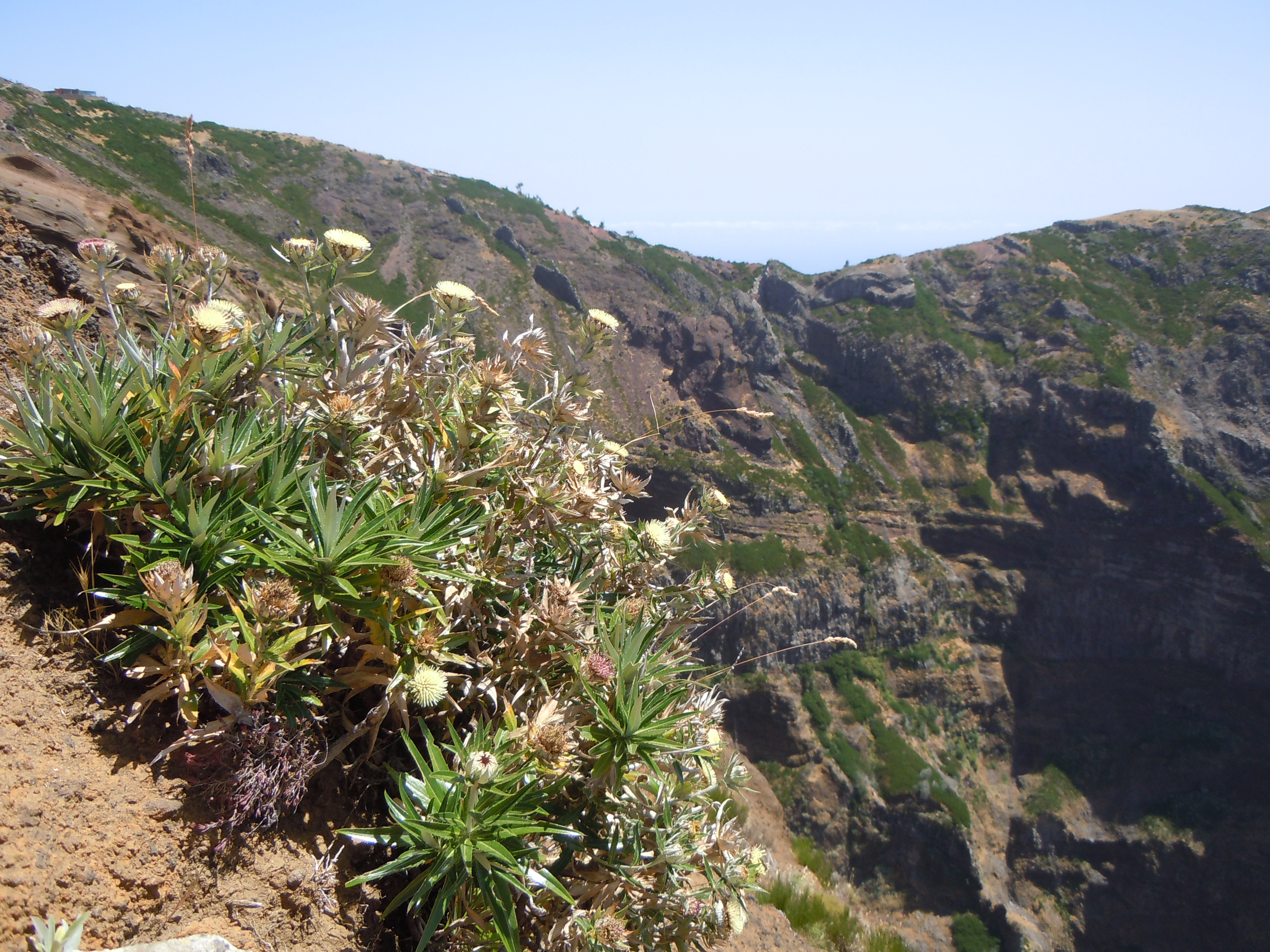 Carlina salicifolia, Pico do Areeiro, Madère